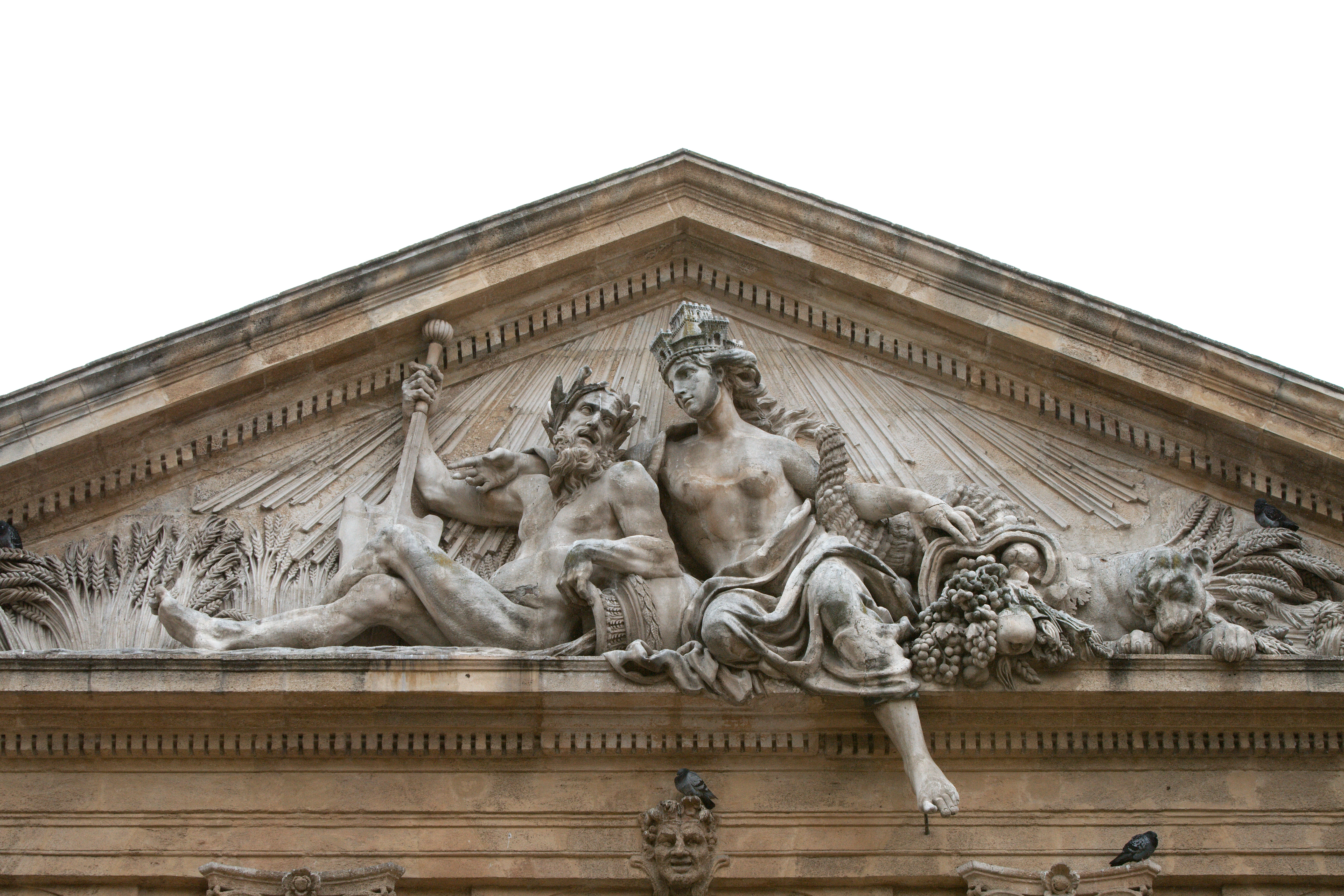 Fronton de la Halle aux Grains, Aix-en-Provence (France).